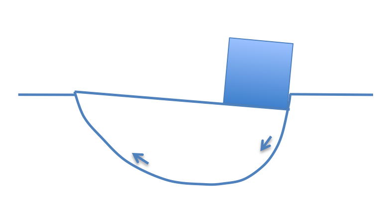 Brud i jord fremkaldt af tung konstruktion